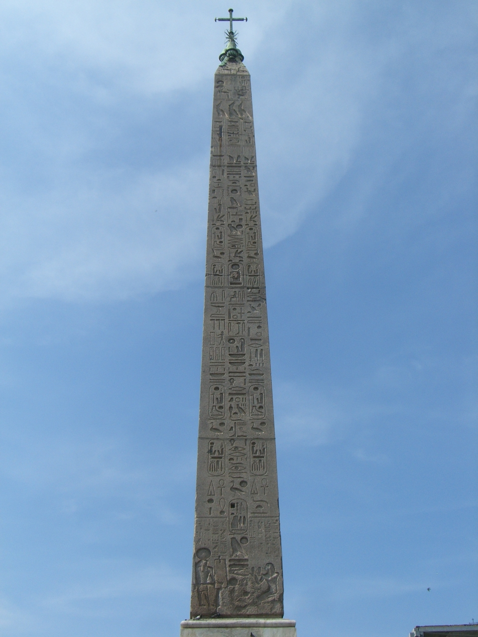 Obélisque de Séthi Ier autrefois dressé à Héliopolis, aujourd'hui sur la Piazza del Popolo à Rome - XIXe dynastie égyptienne